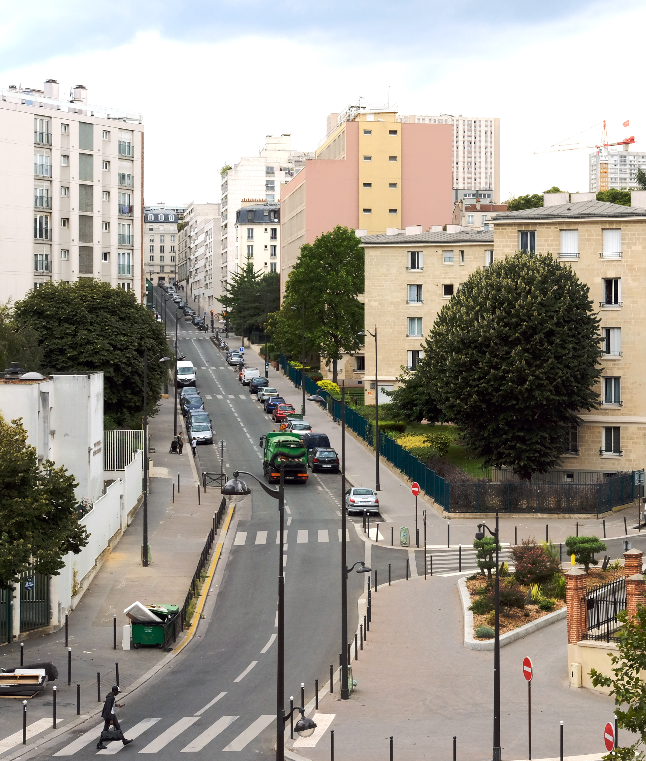 Rue Eugéne-Oudiné - Paris XIII